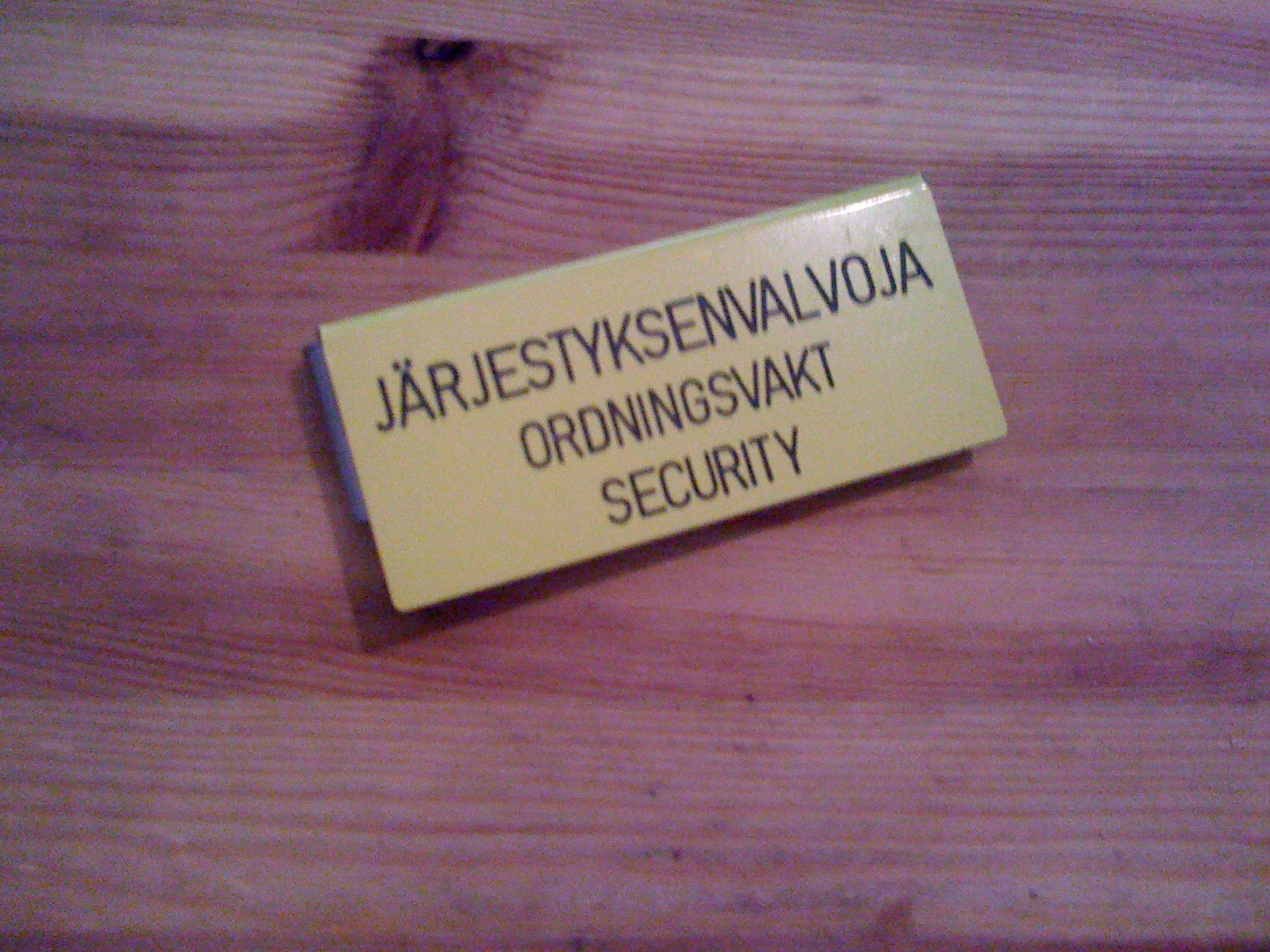 Järjestyksenvalvojan tunnuslaatta